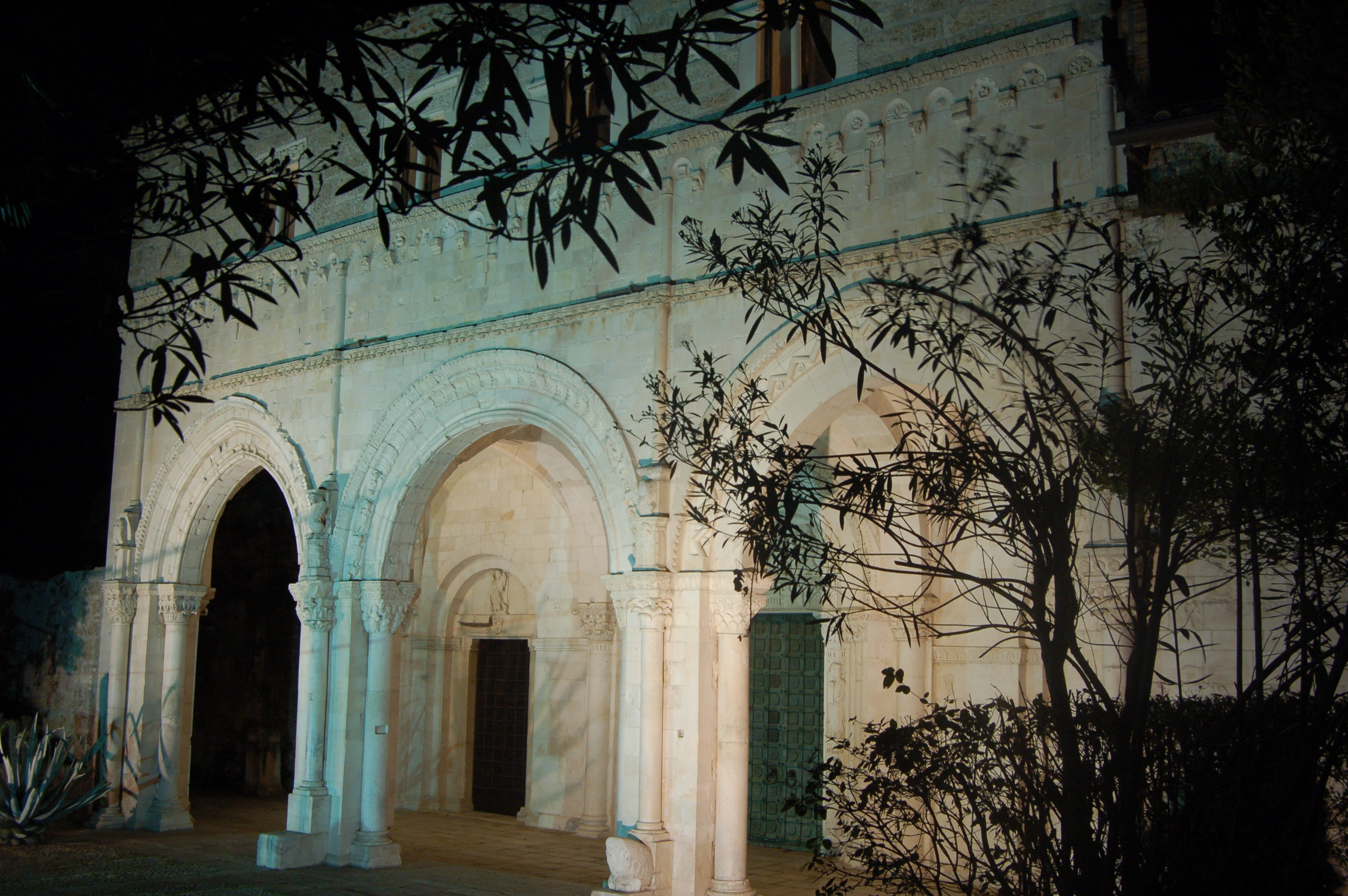 Esterno dell'Abbazia di San Clemente a Casauria, PE, Italia